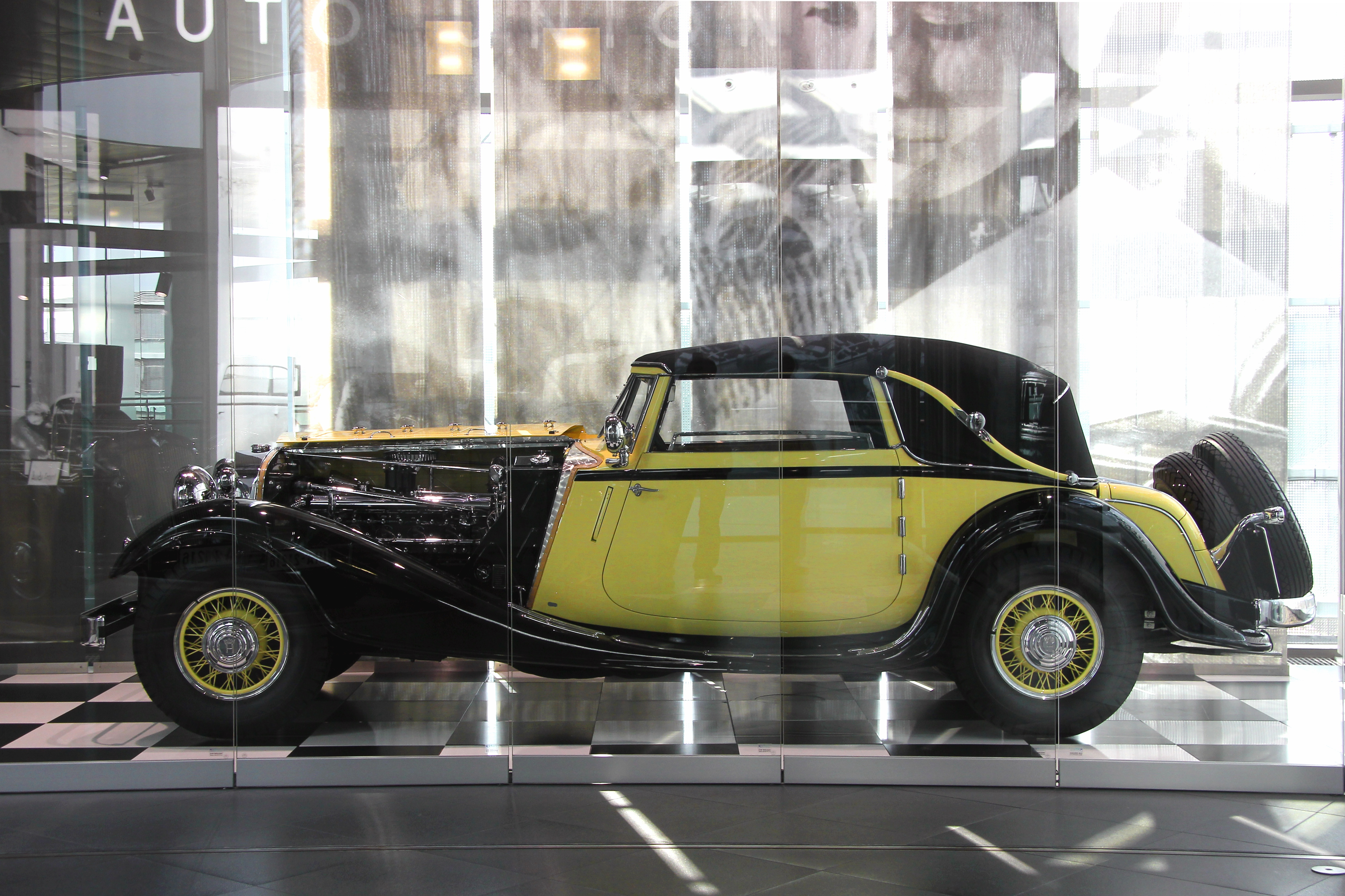 Horch 670 Cabriolet, V-12-Motor